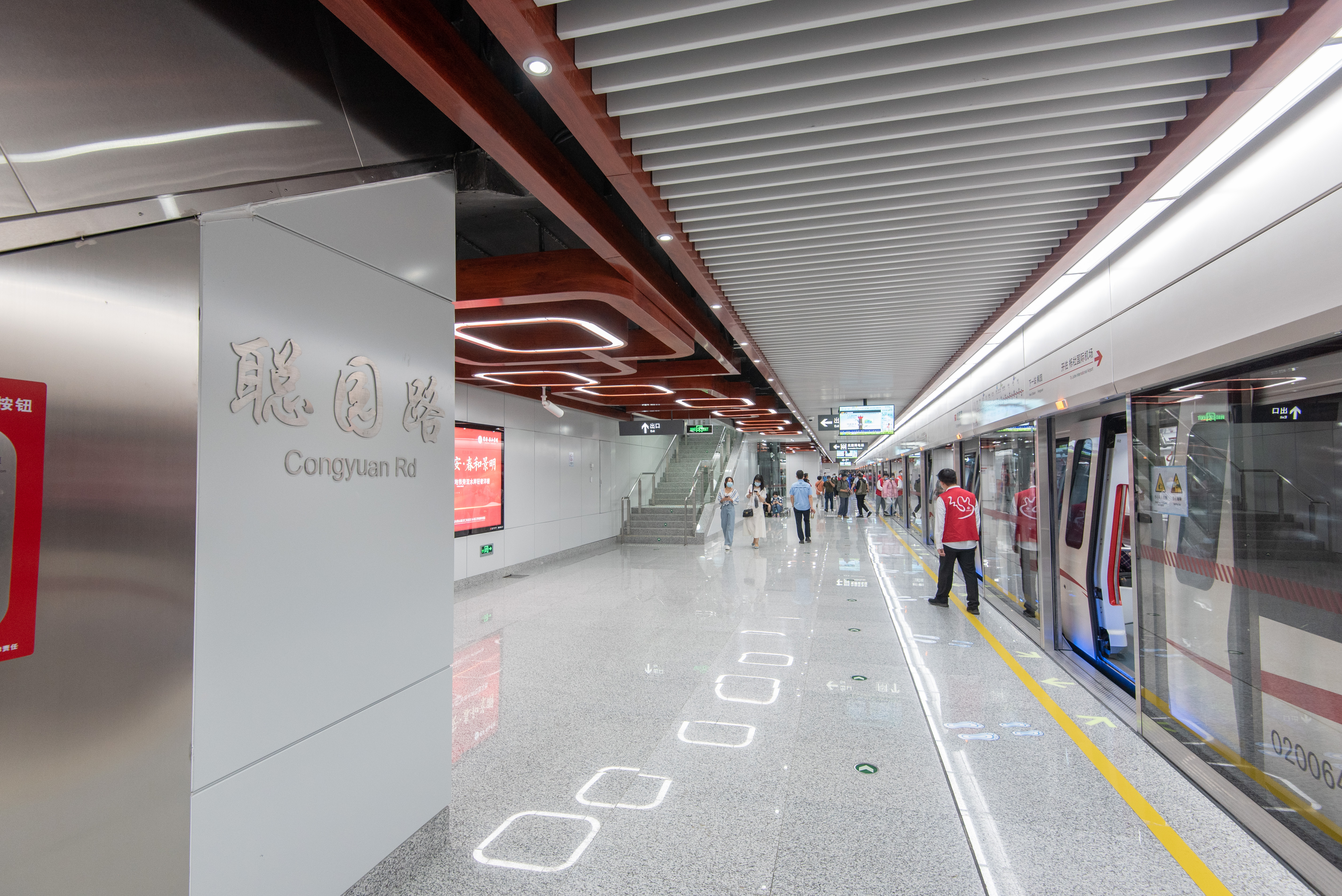 宁波轨道交通聪园路站